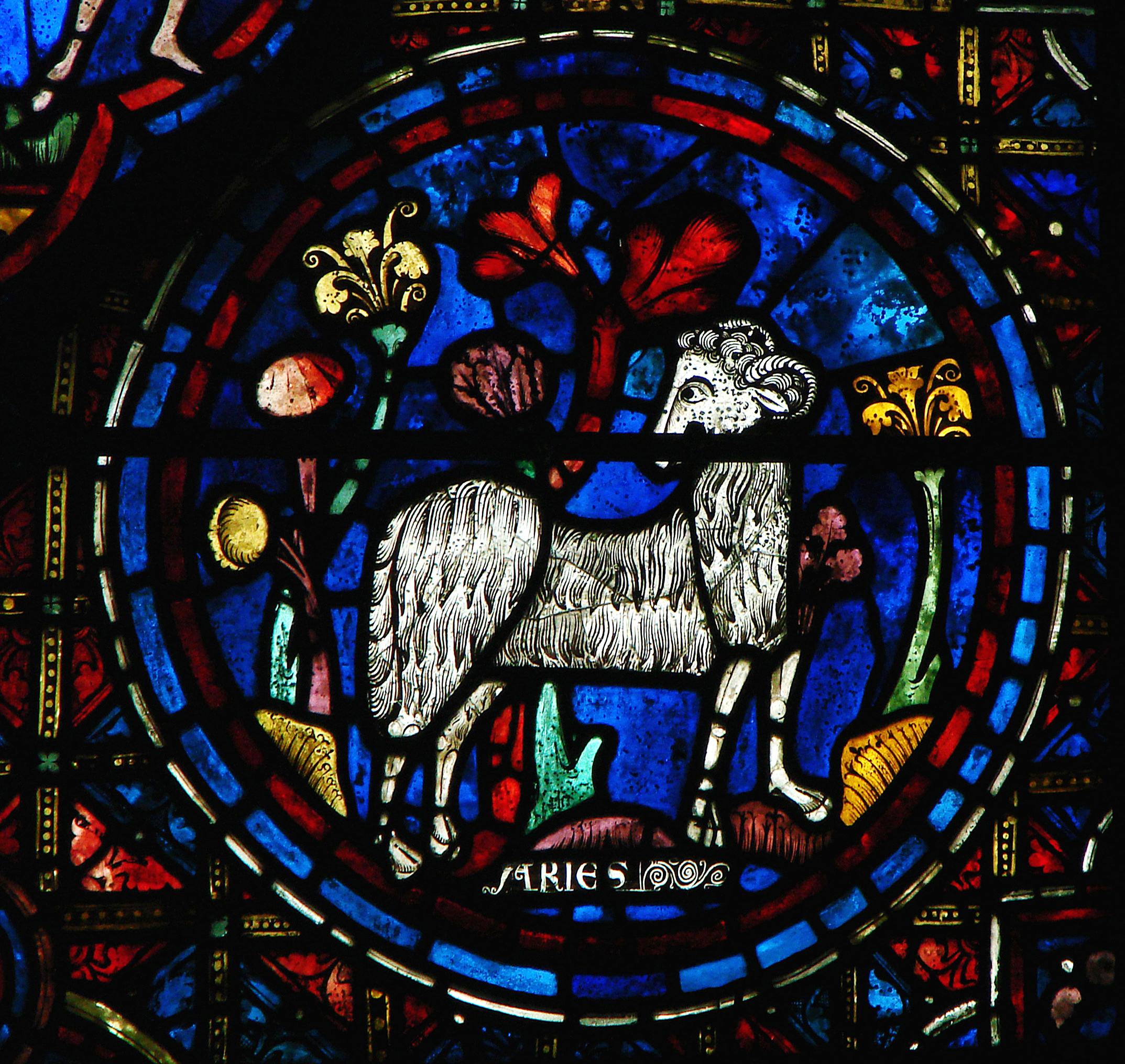 Détail d'un vitrail figurant le zodiaque et les mois: le bélier. Cathédrale Notre-Dame de Chartres.